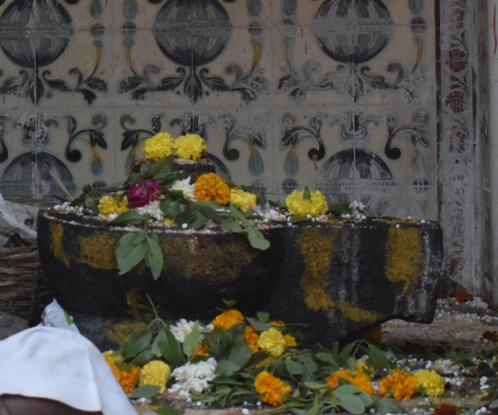 श्री अमृत लिंग